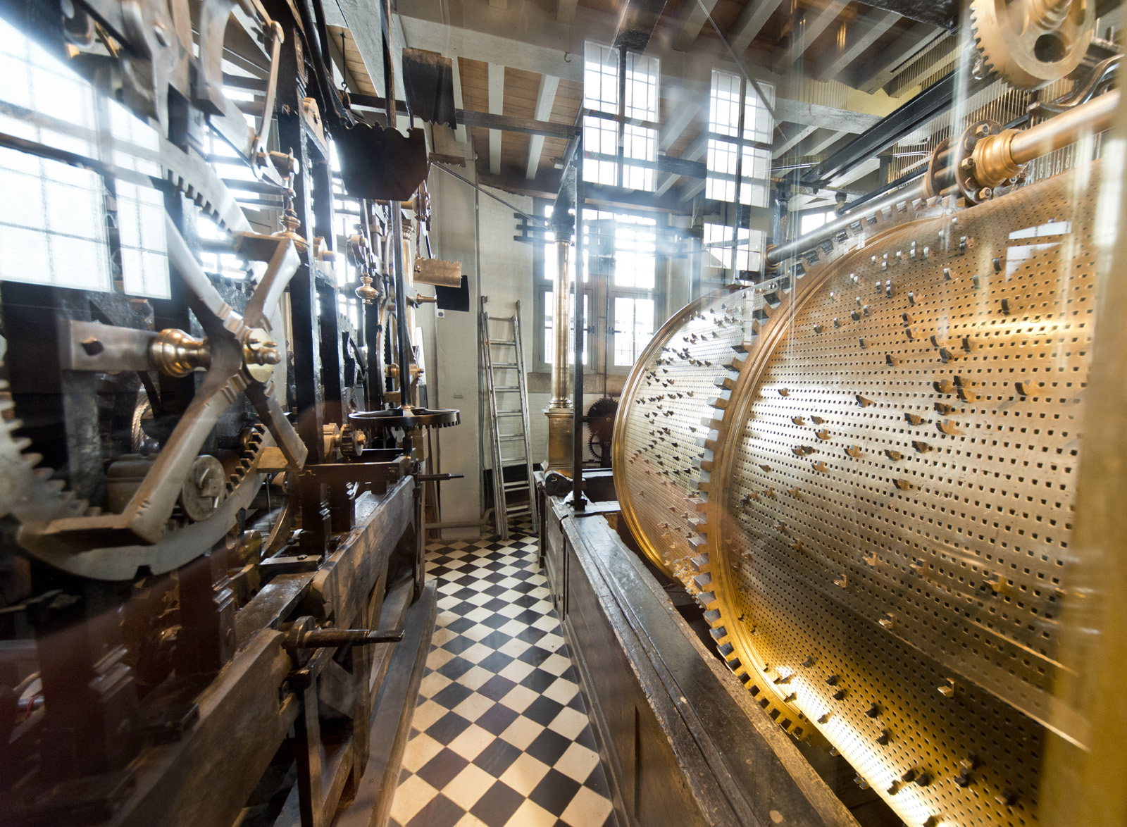 Belfort